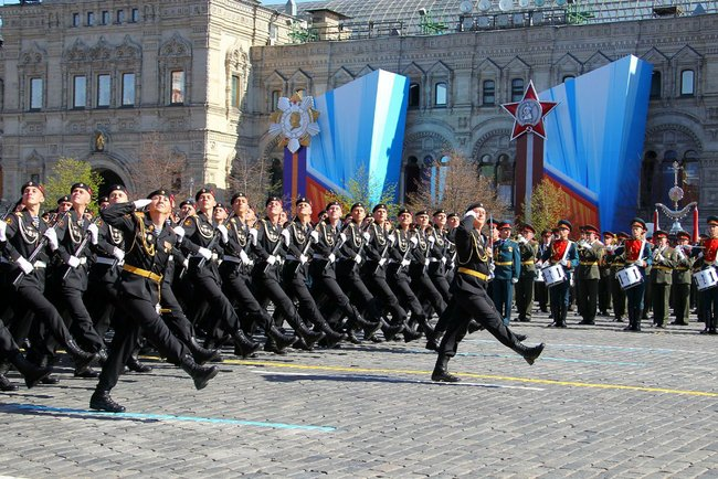 Военный парад в ознаменование 68-й годовщины Победы в Великой Отечественной войне.